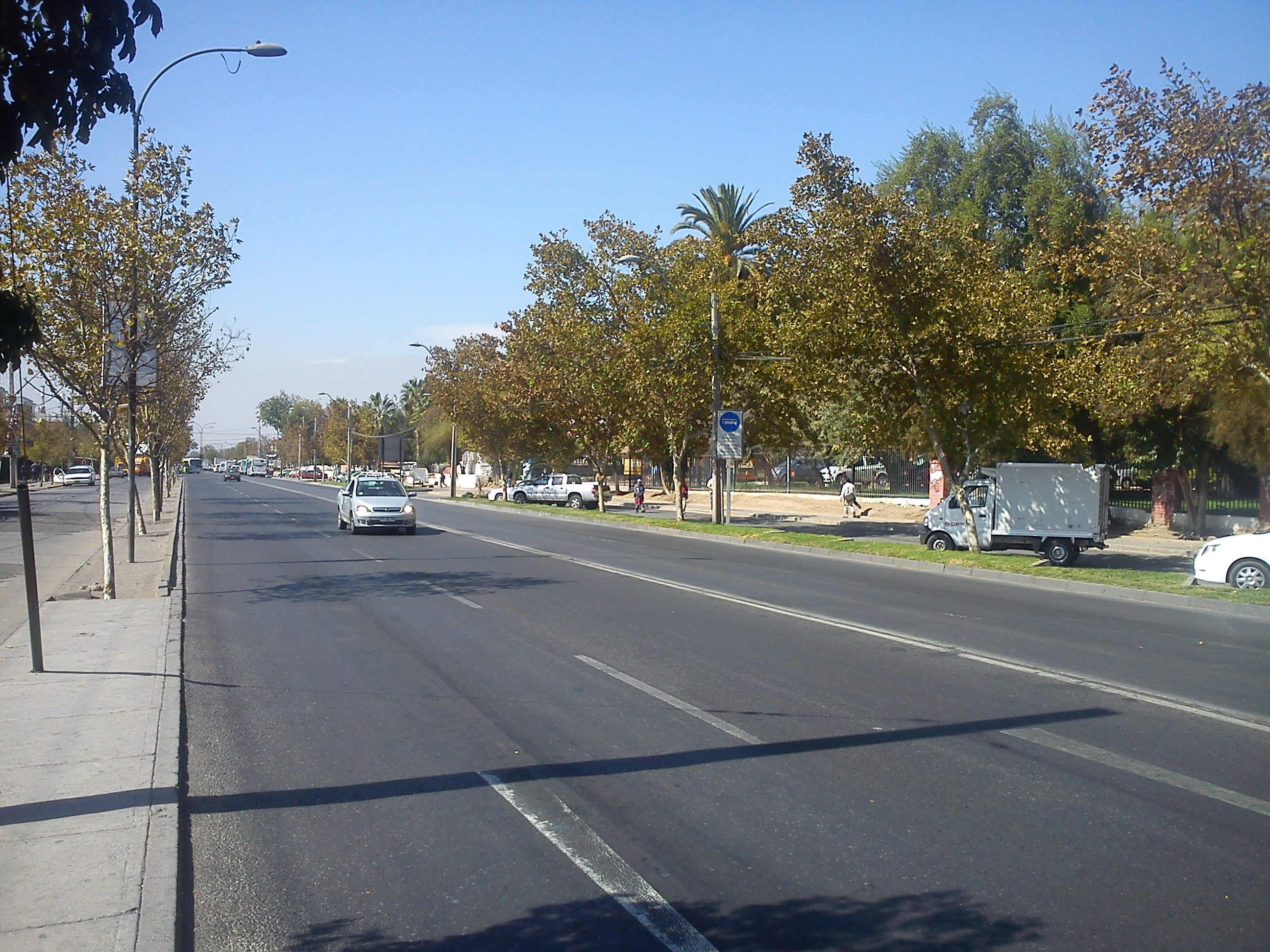 Avenida San Pablo a la altura de la Municipalidad de Pudahuel